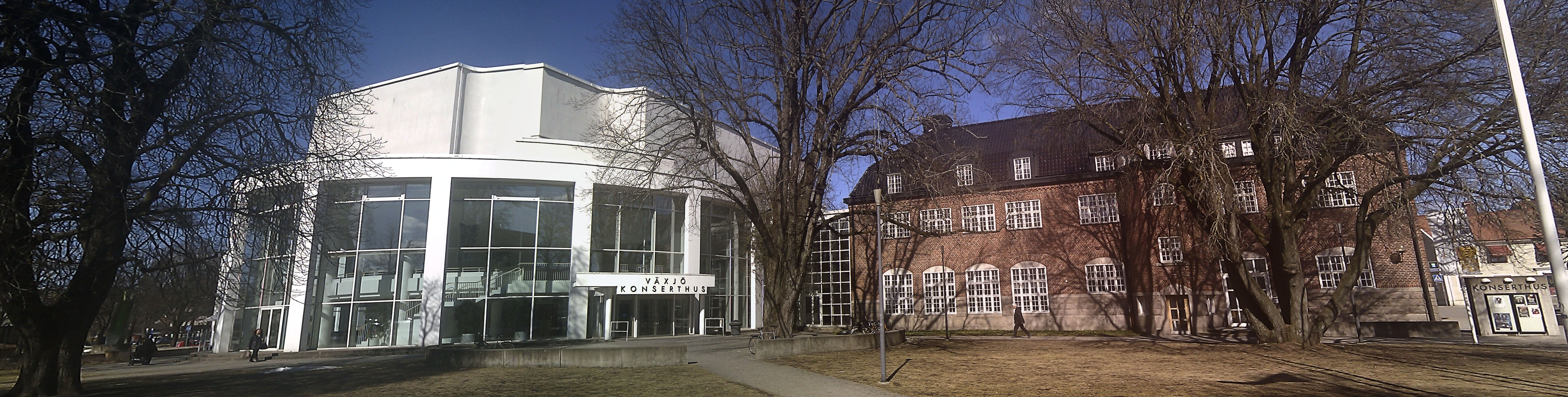 Konserthuset i Växjö